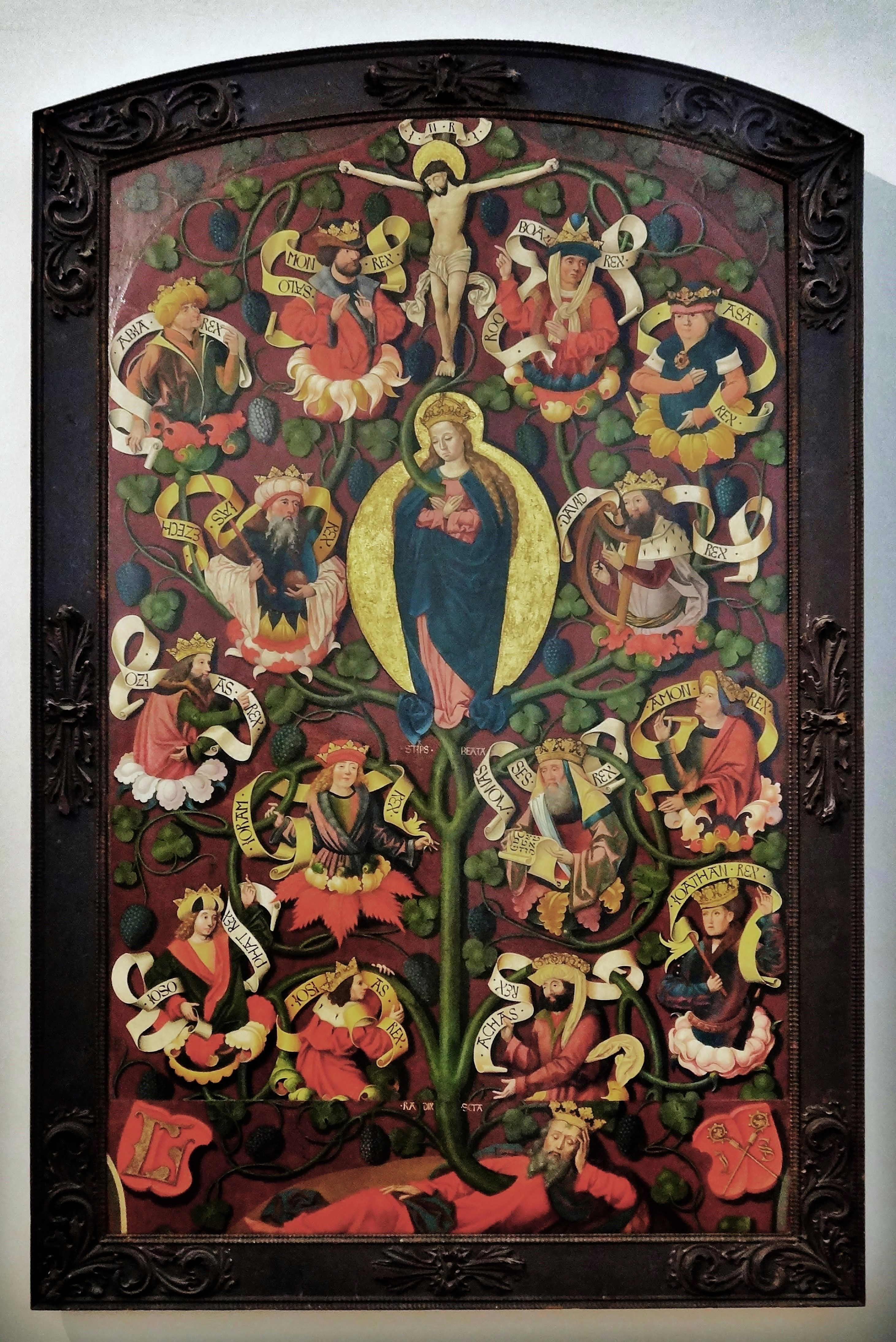 Benediktinerstift St. Lambrecht, Stiftsmuseum, gotische Darstellung des Stammbaumes Jesu